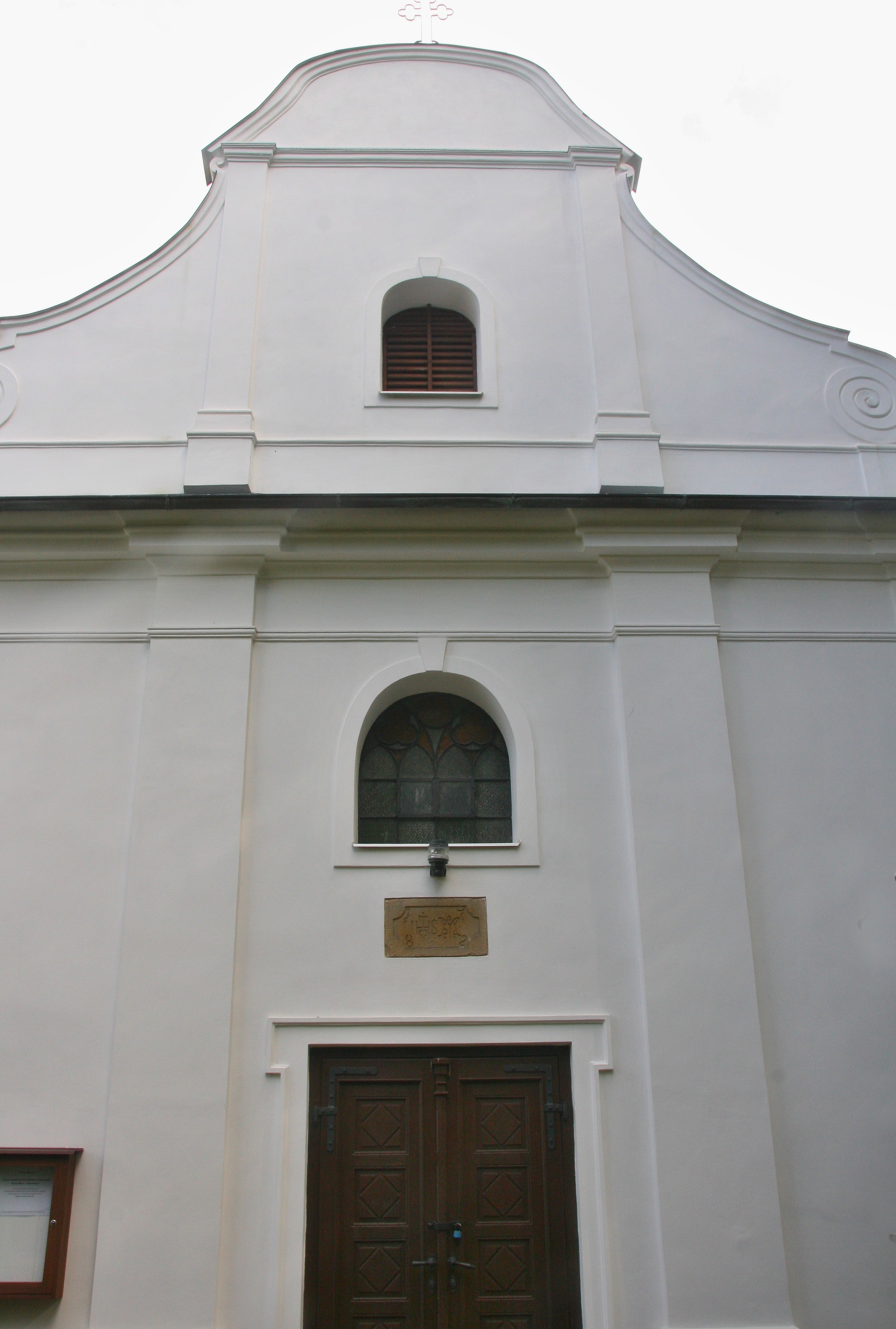 Kostel Neposkvrněného Početí Panny Marie, Heřmánky.